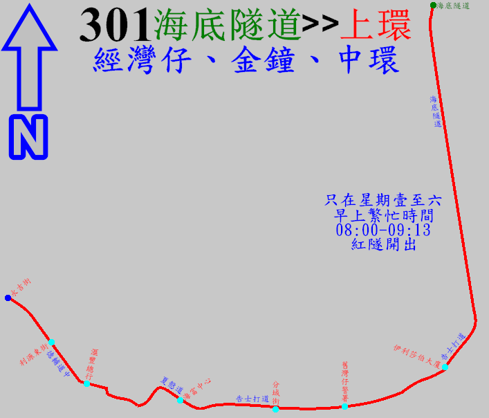 中文（香港）: 過海隧巴301路線的走線圖